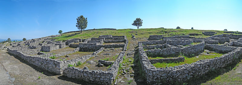 Description Castro de San Cibrán de Las (Lansbricae) (San Amaro-Punxín) (Ourense). Barrio do leste desde a muralla exterior (detalle) Date6 May 2007SourceFeita por E.Leclere FernándezAuthor (Reusing this file) (Coa autorización expresa do autor) Castro de San Cibrán de Las (Lansbricae) (San Amaro-Punxín) (Ourense). Barrio do leste desde a muralla exterior (detalle)